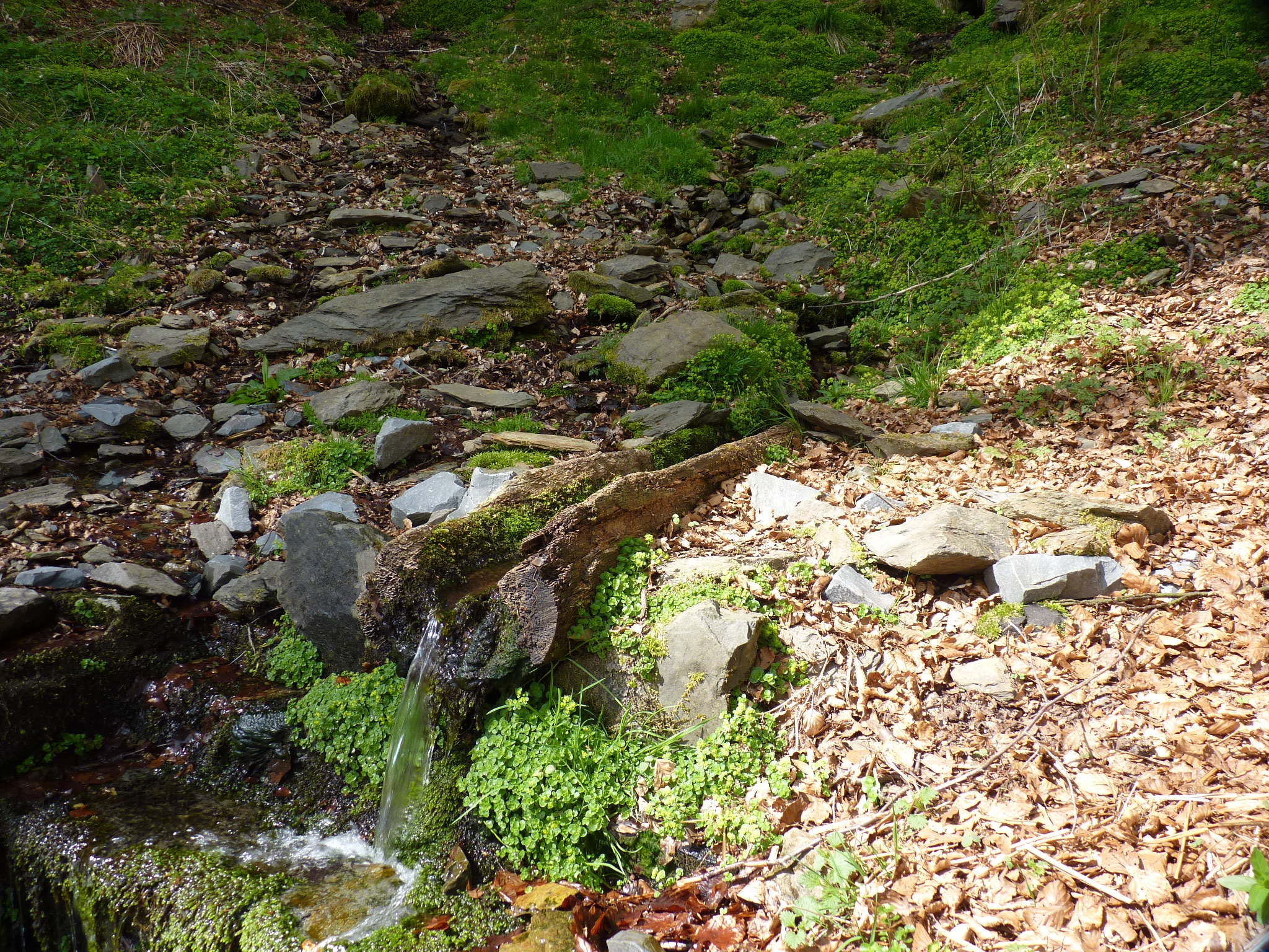 Die Sombornquelle im April 2014